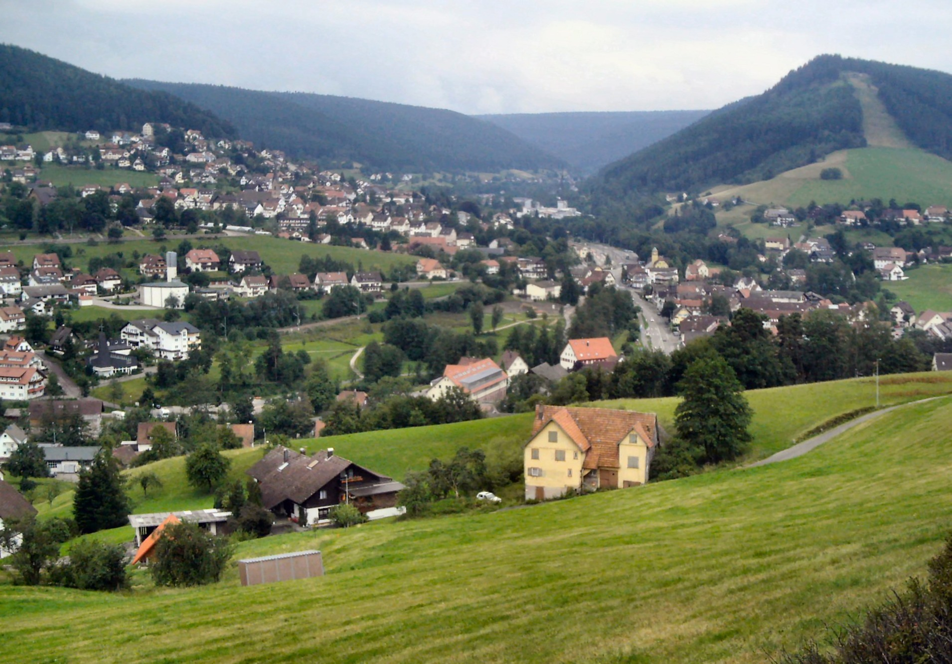 Blick auf Baiersbronn im Schwarzwald. eigenes Bild Foto: A.Lehr im August 2006